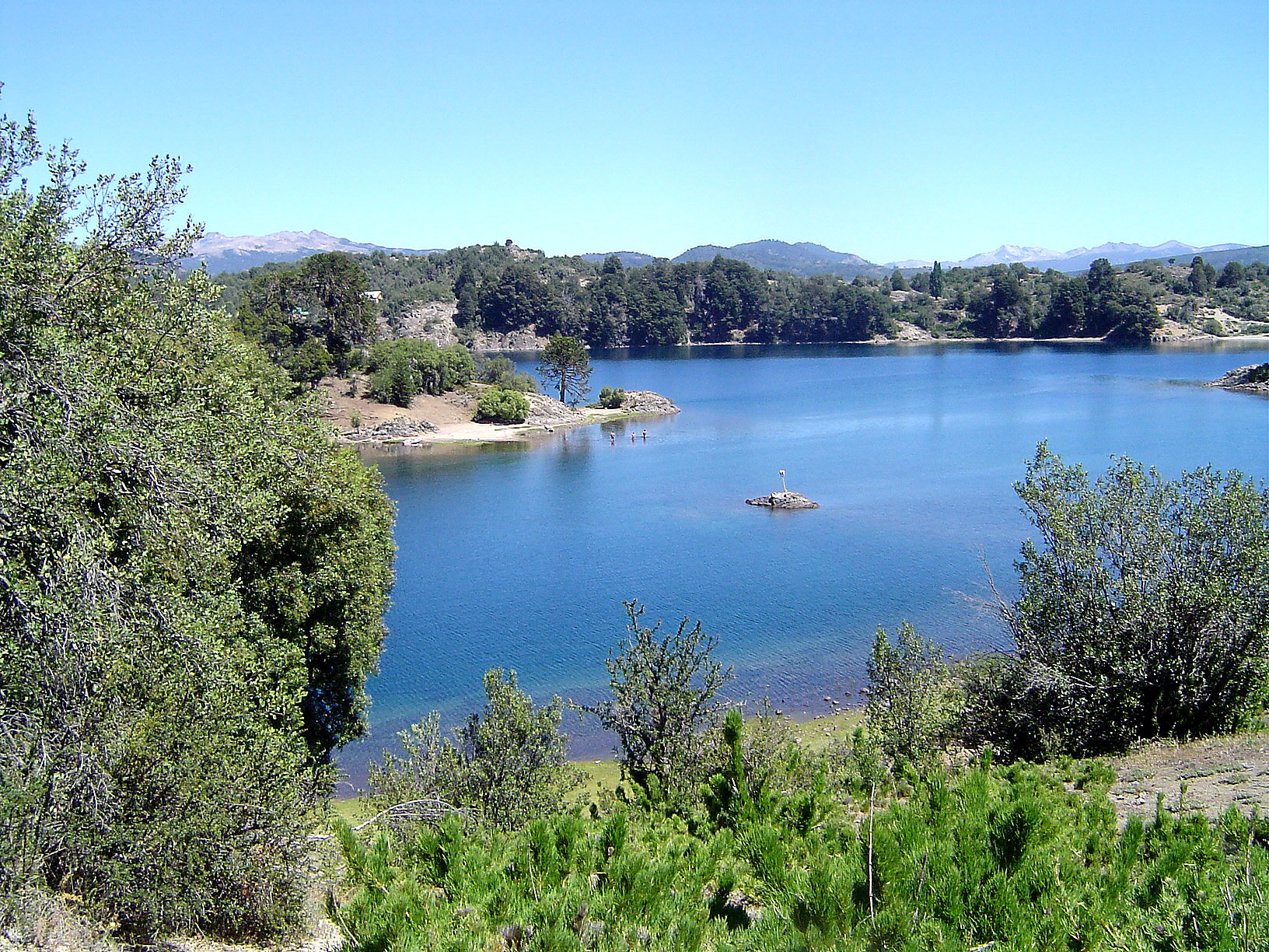 Villa Pehuenia